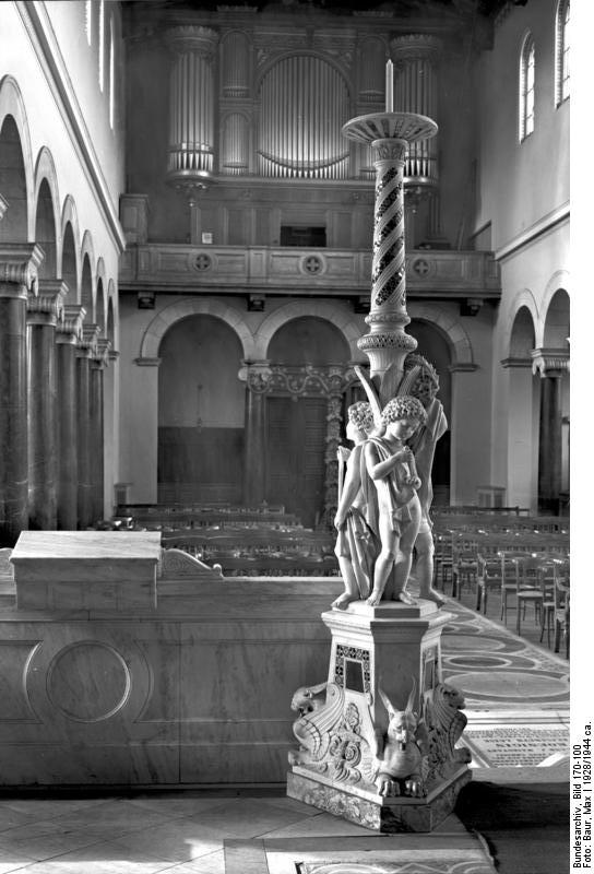 Potsdam.- Friedenskirche